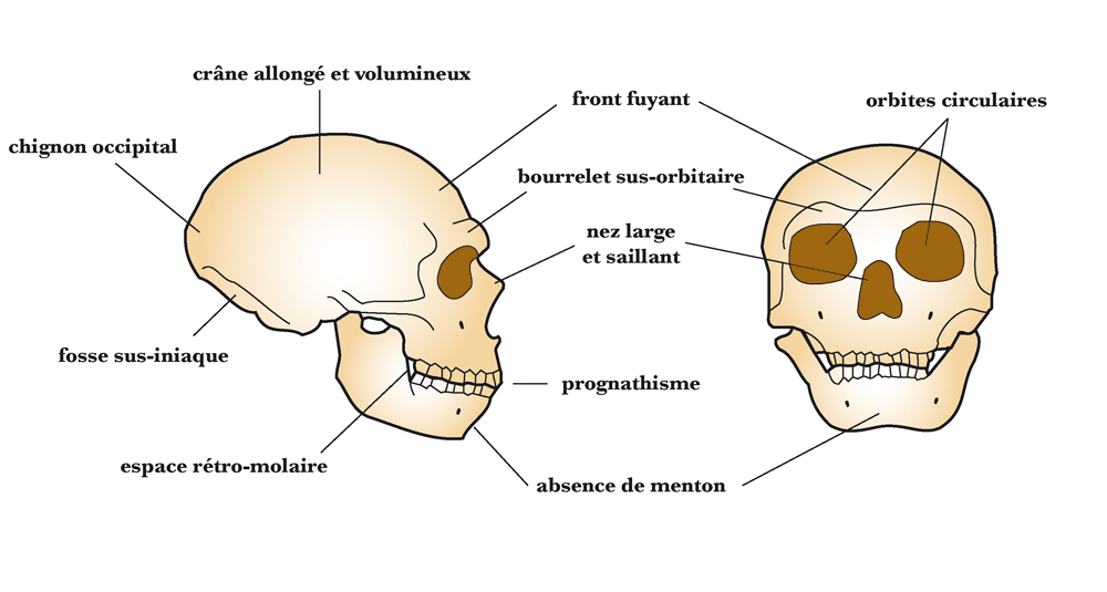 principaux caractères crâniens de Homo neanderthalensis - création personnelle Utilisateur:120 (d'après Hublin, J.-J. « Origine et évolution des Néandertaliens », in Aux origines de l'humanité, vol. 1, Y. Coppens et P. Picq (dir.), Fayard, (2001), modifié)